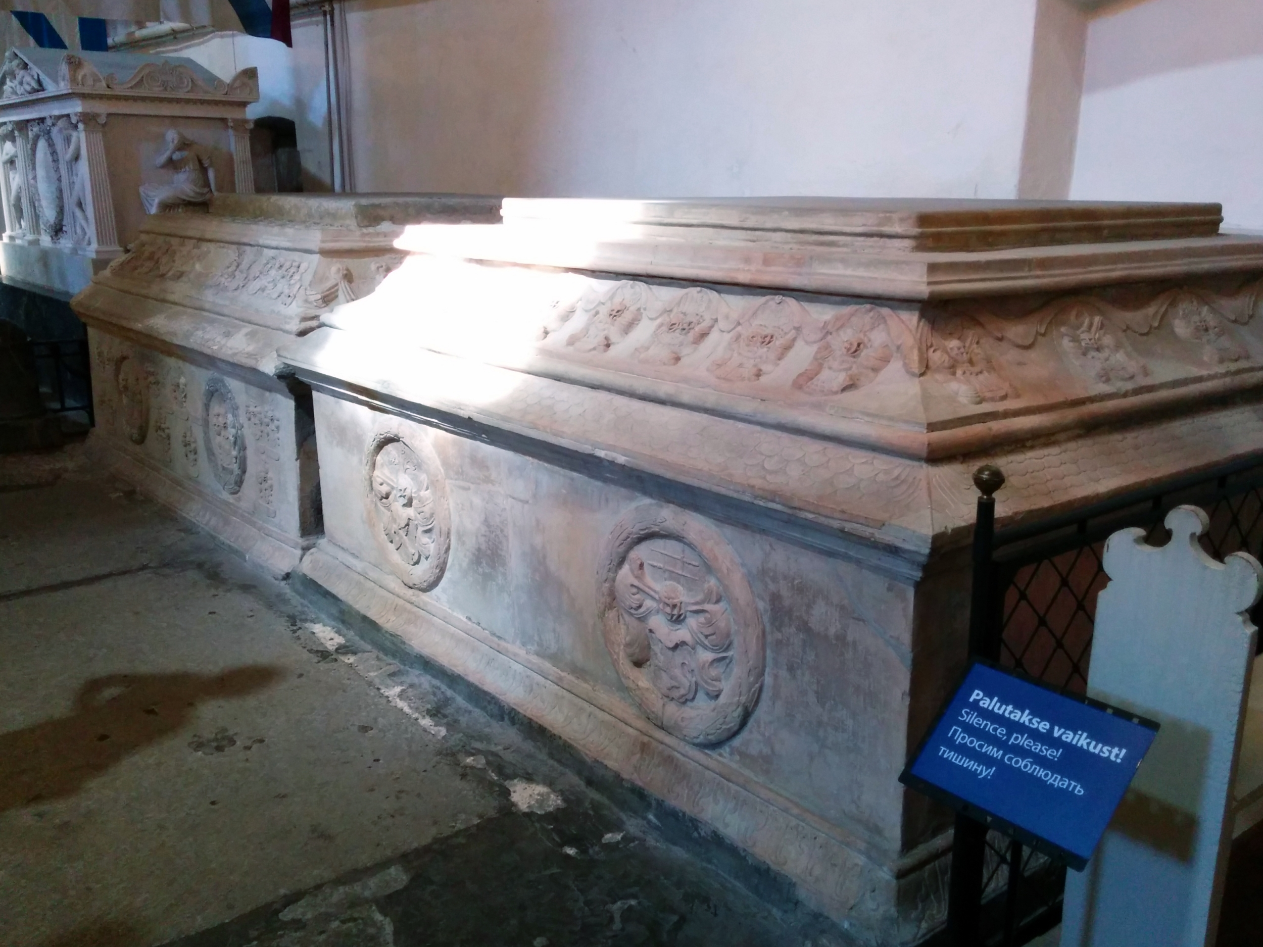 Feldmarssal Fabian von Ferseni hauamonument Tallinna Toomkirikus